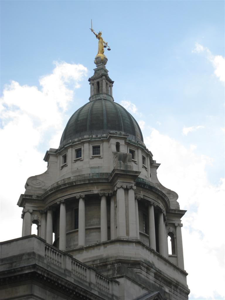 Old Bailey